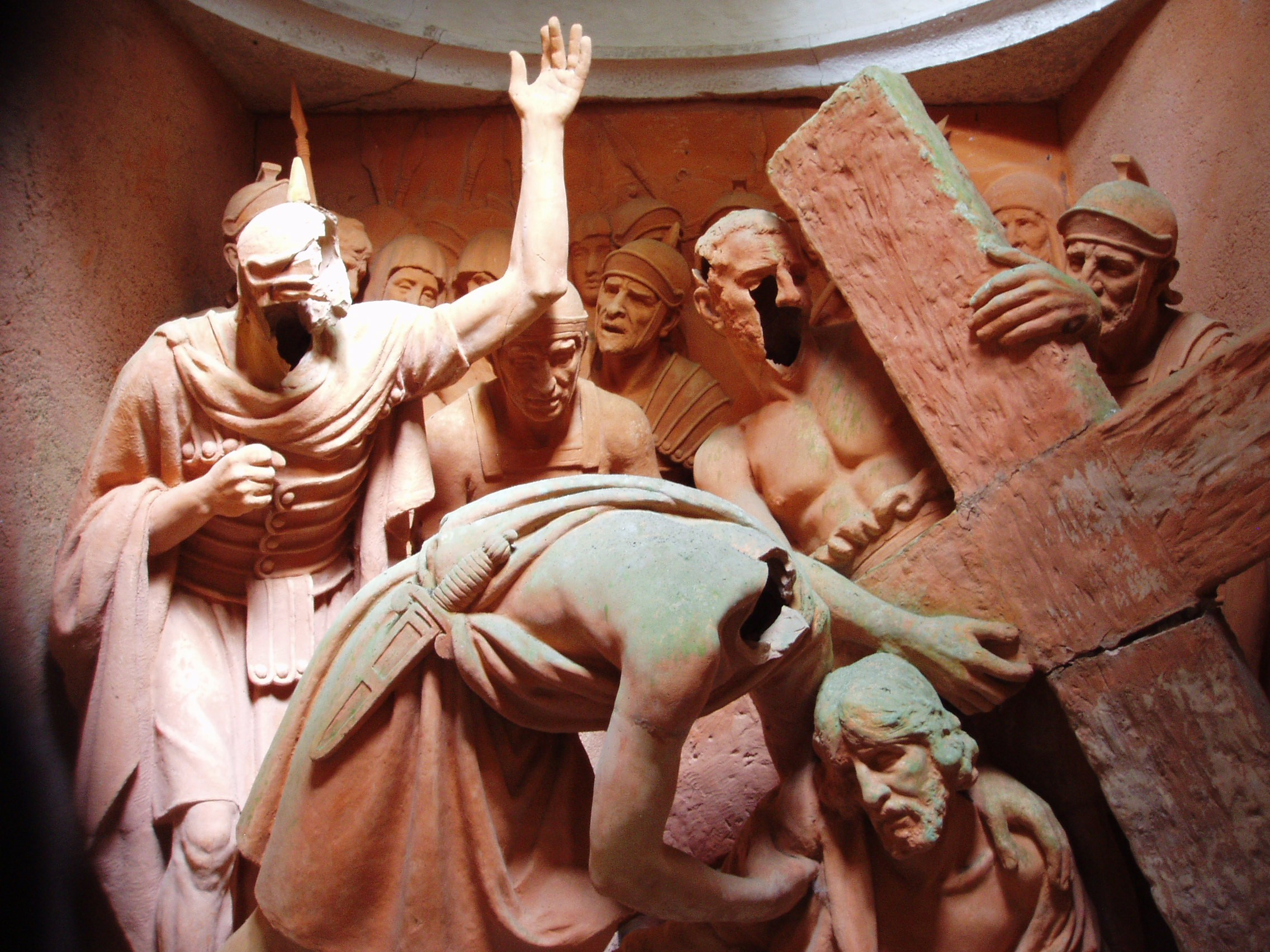 Viacrucis en el bosque de Buçaco, Portugal.